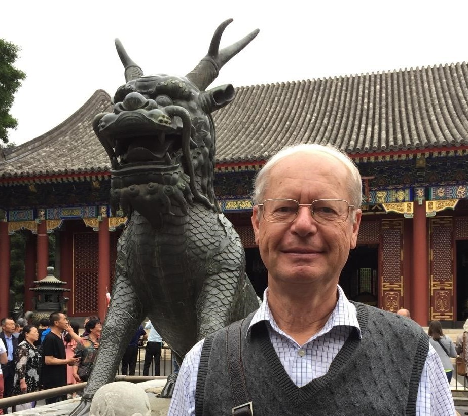 Ronald Weinberger vor Sommerpalast in Peking